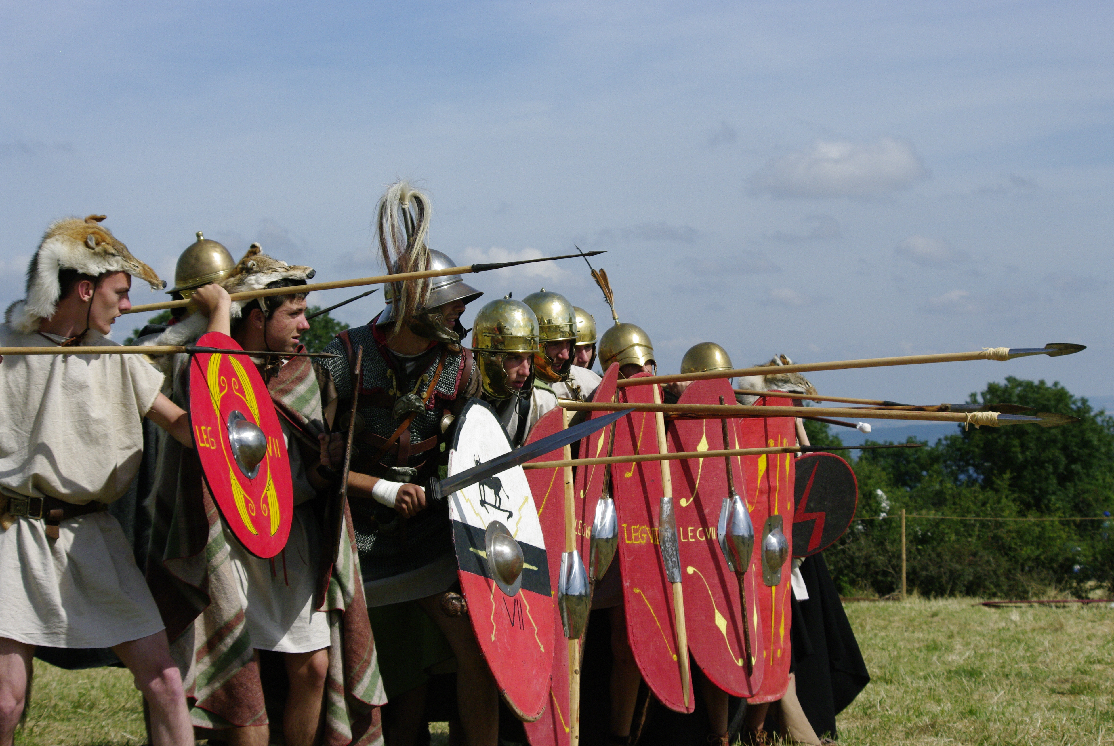 Groupe de reconstitution romain. Photographie réalisée le 22 juillet 2012 sur le plateau de Gergovie lors des Arverniales.